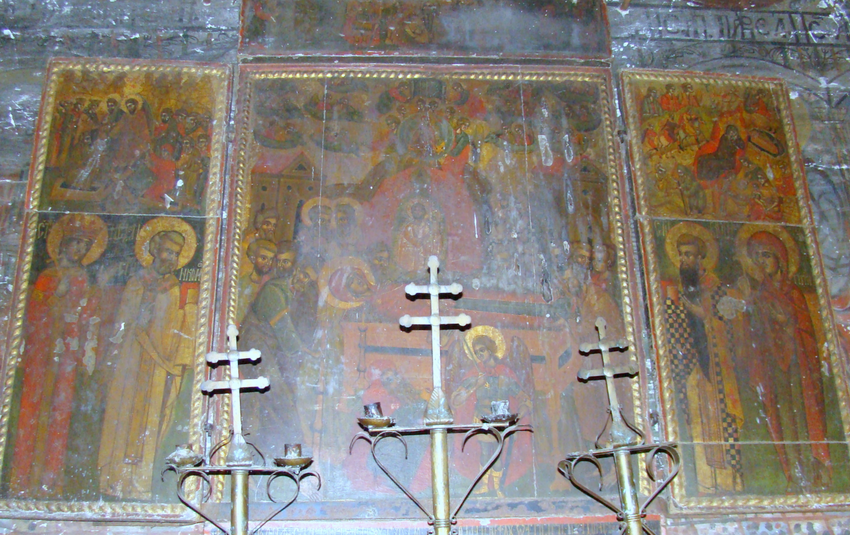 Biserica de lemn din Agârbiciu, județul Cluj